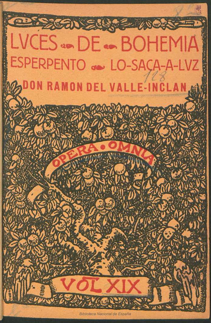 Luces de bohemia : esperpento lo saca a luz Ramón del Valle Inclán Autor: Valle-Inclán, Ramón del (1866-1936) Fecha: 1924 Datos de edición: Madrid, Renacimiento